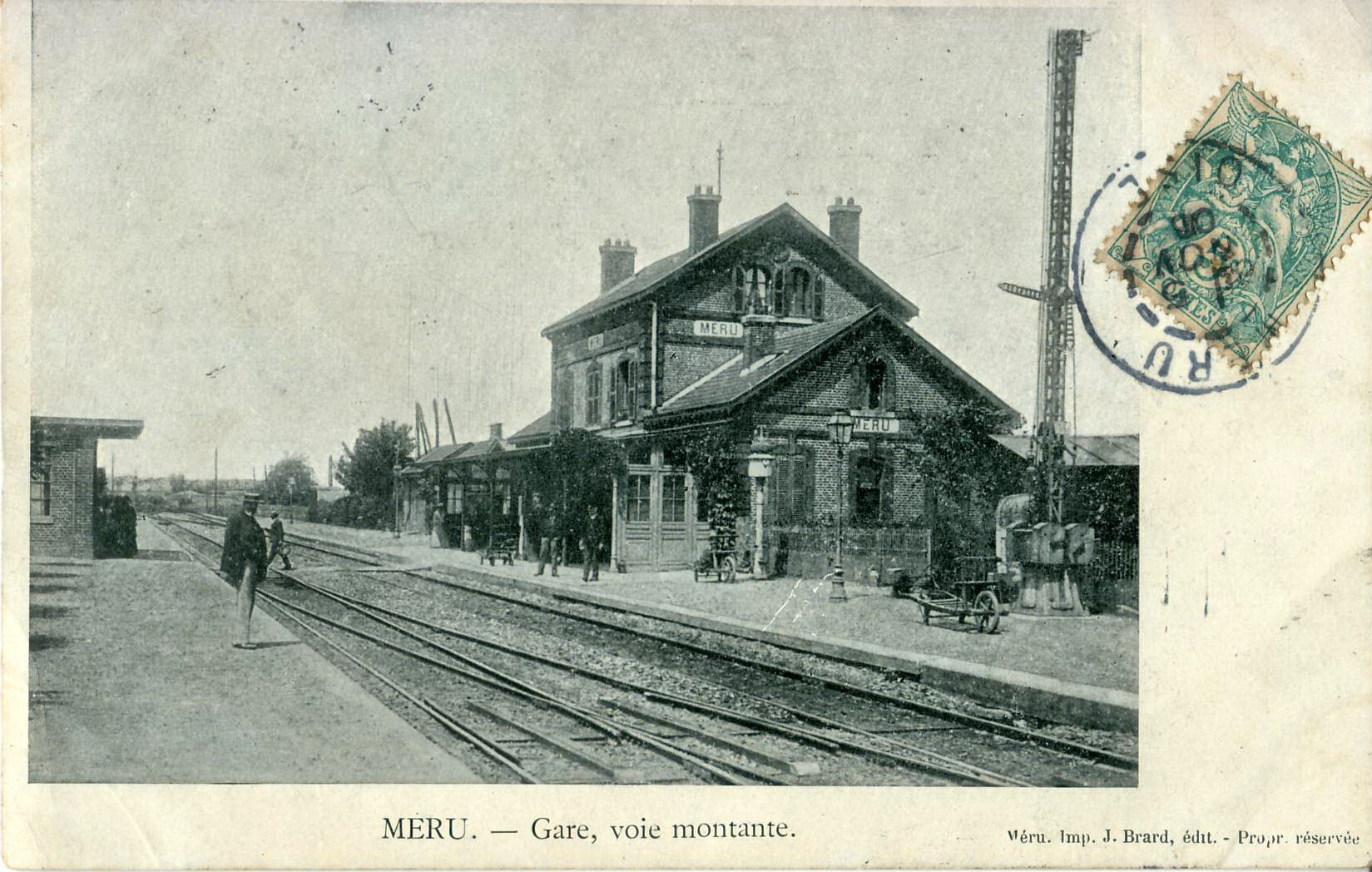 Carte postale ancienne éditée par BrardGare de Méru : voie montante. L'électro-Sémaphore Lartigue Nord est bien visible sur le quai à coté du bâtiment voyageurs